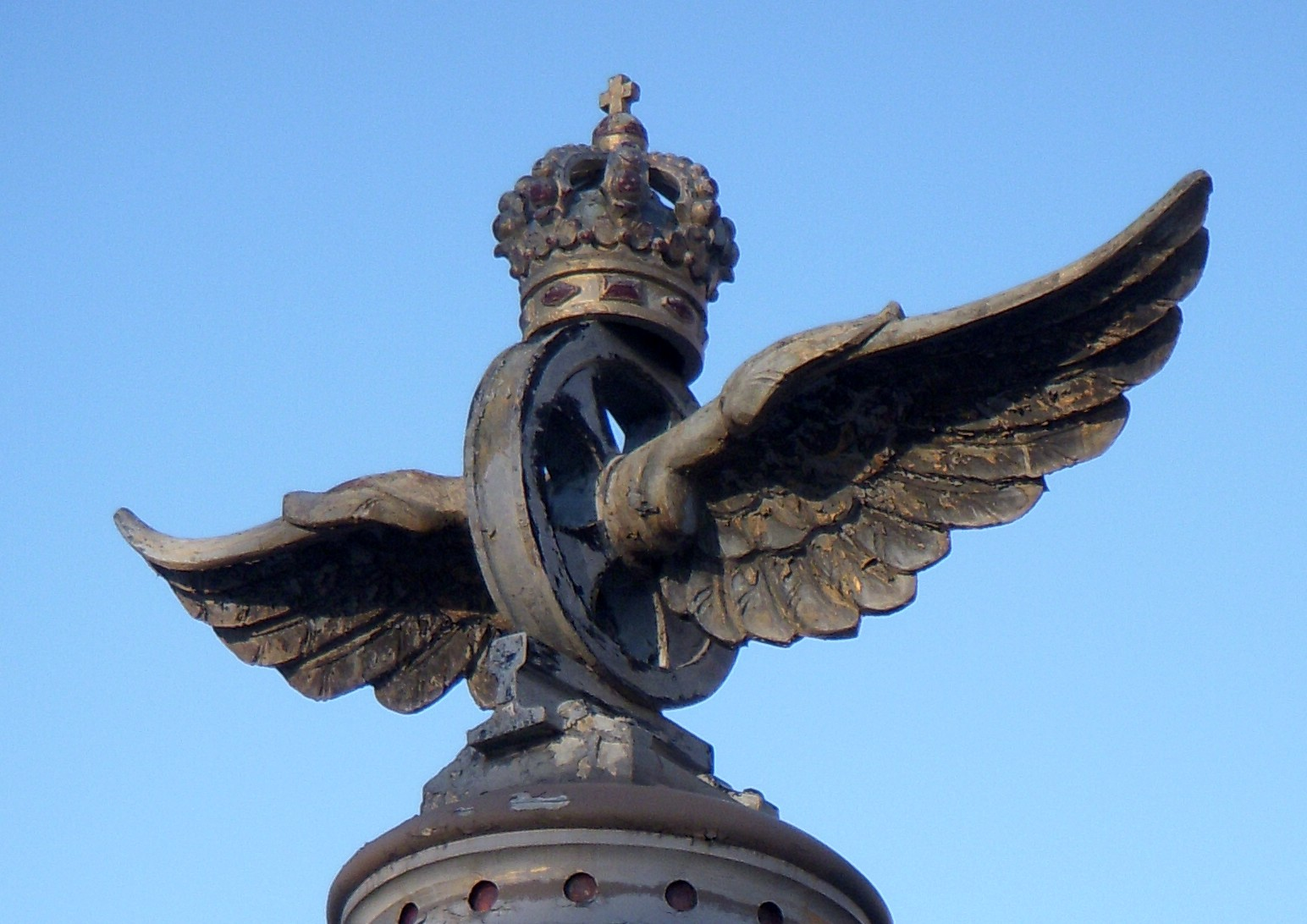 Statens järnvägars bevingade hjul på klockan vid centralen i Stockholm